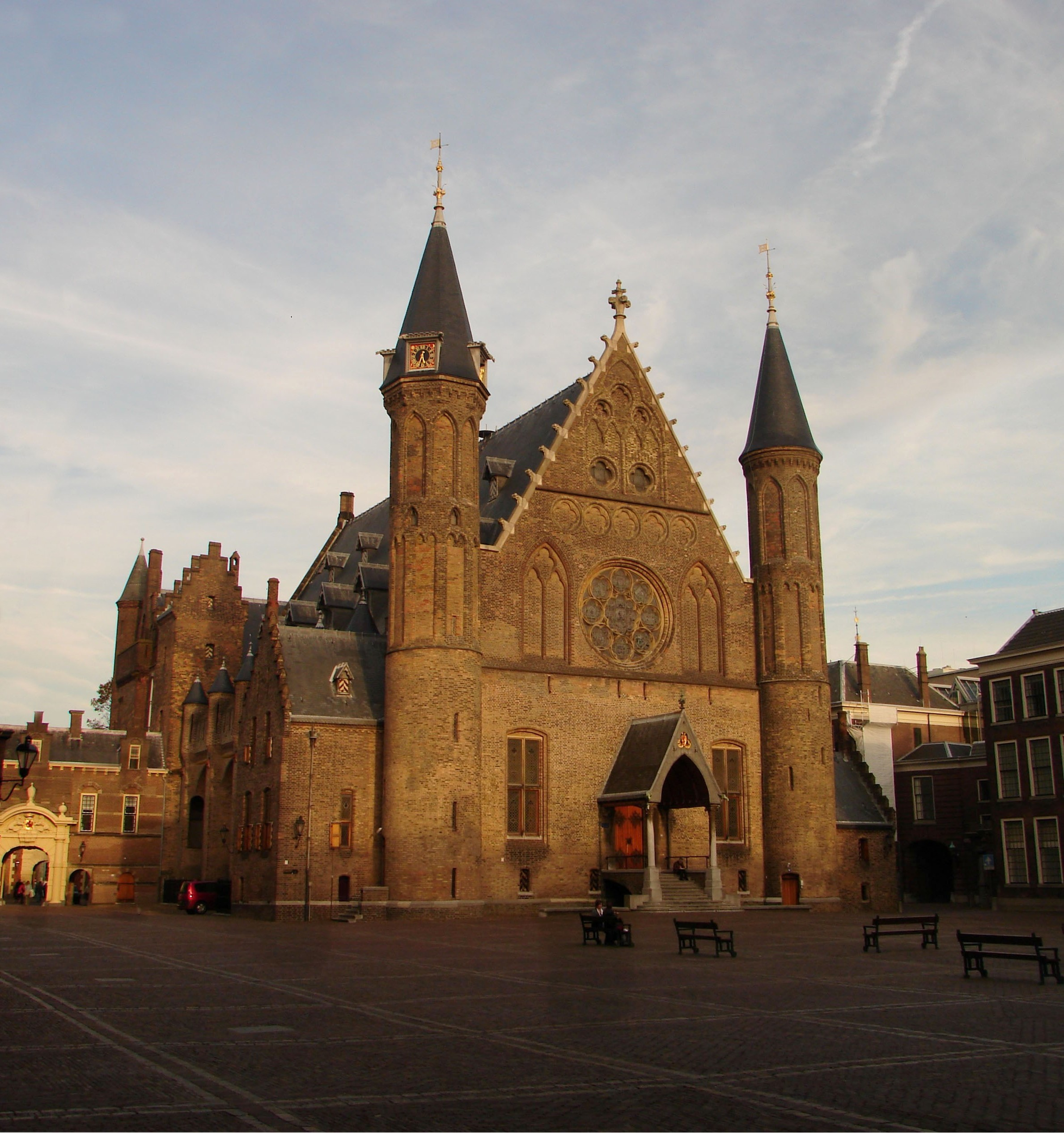 Overzicht van het Binnenhof en Ridderzaal te 's Gravenhage